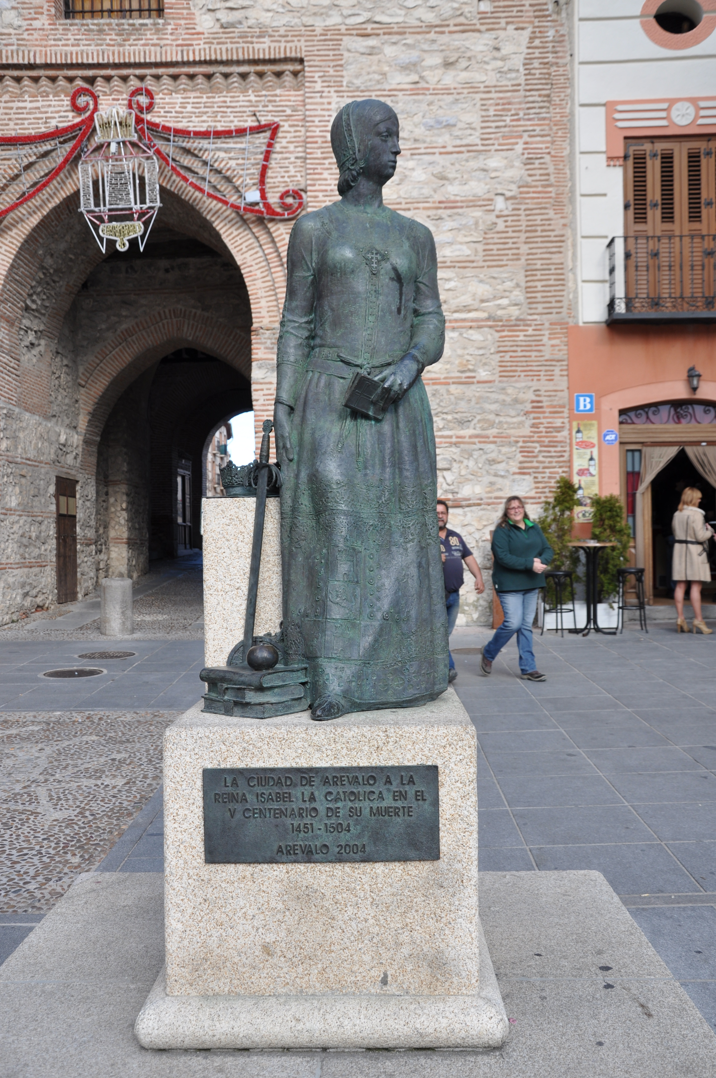 Estatua de Isabel la Católica, reina de Castilla. Arévalo, provincia de Ávila, España.